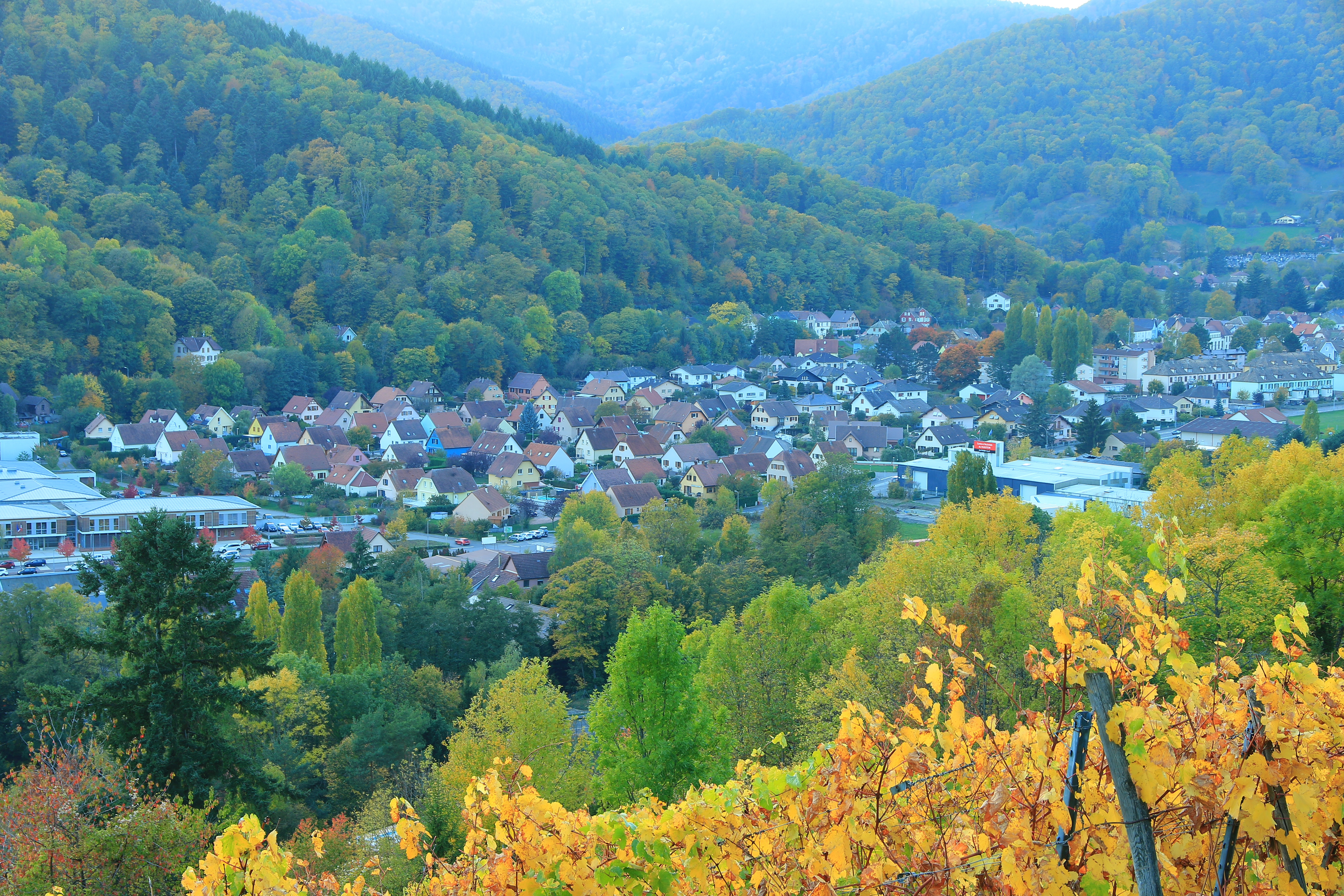 Les "Burgmatten" (les prés du château), situés dans le bas du village.